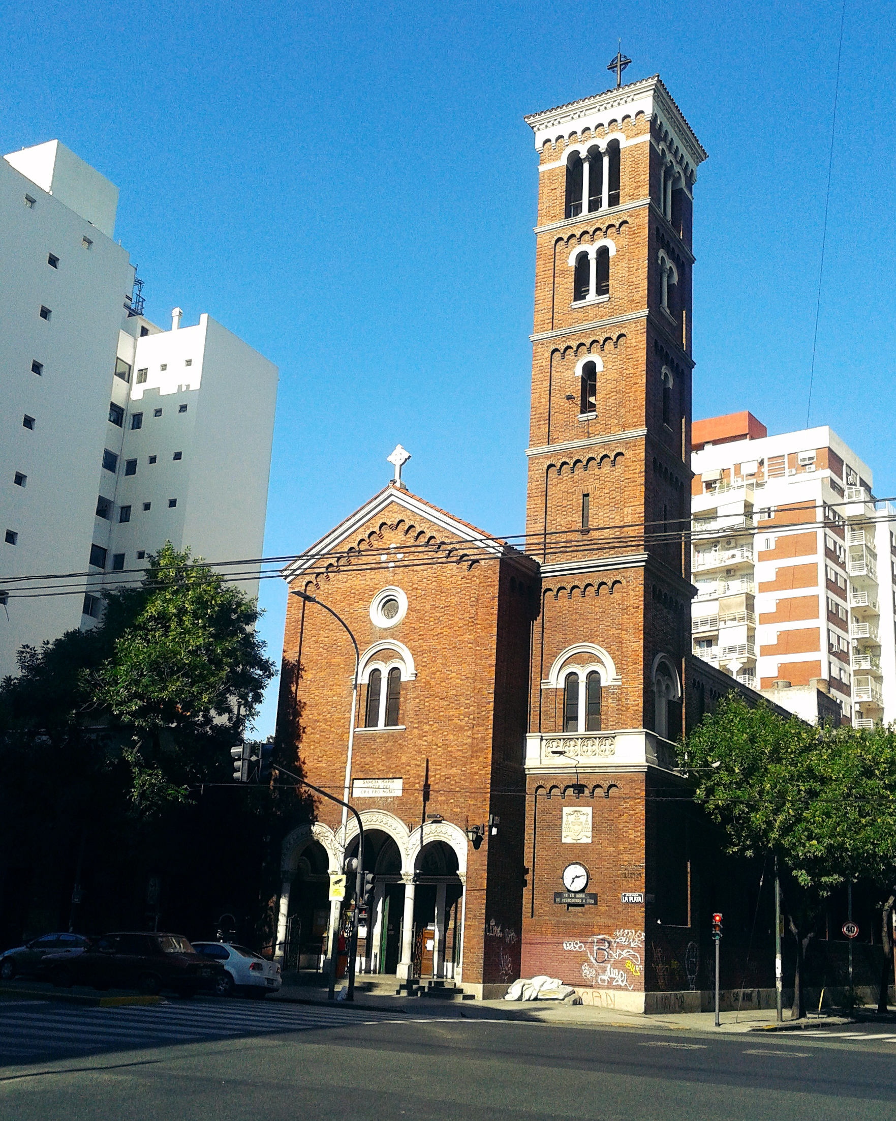 Parroquia Santa María - Caballito - Buenos Aires - Argentina.